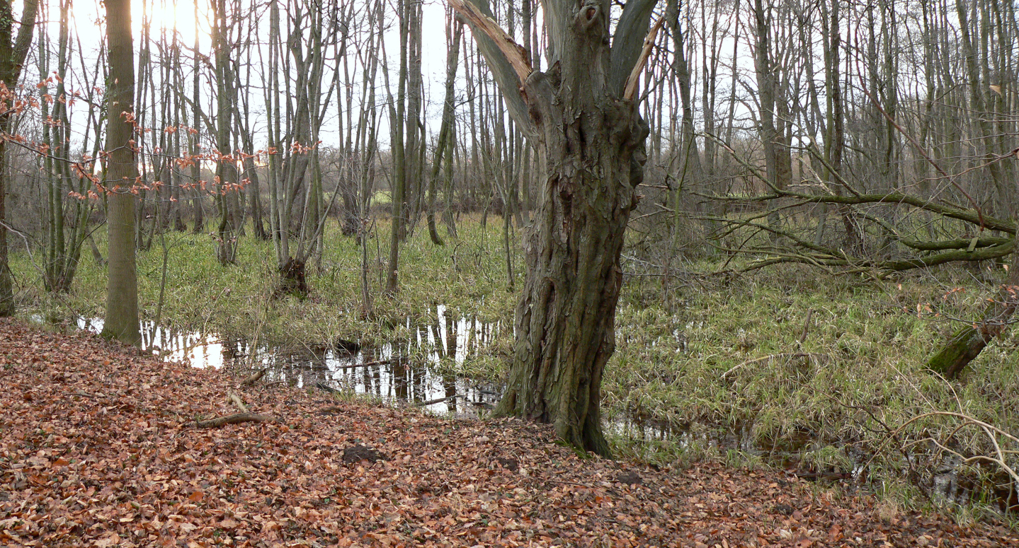 Auwald im Naturschutzgebiet Sundern in Hemmingen